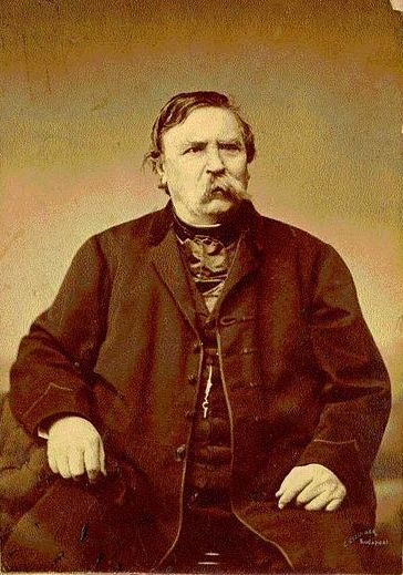 Ellinger Ede, “Deák Ferenc fényképe